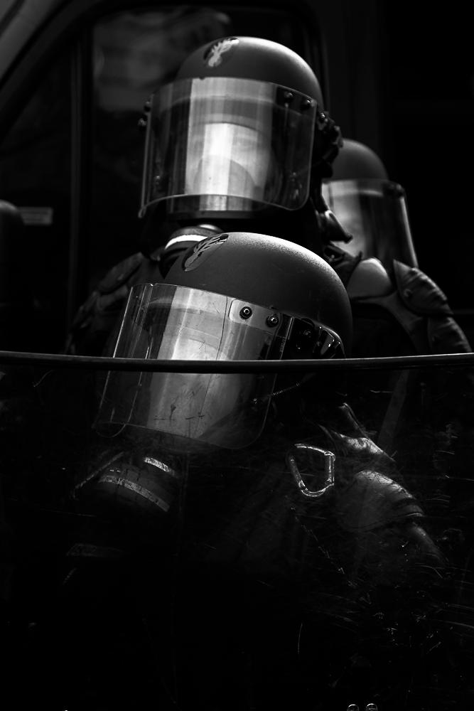 Les Gilets Jaunes